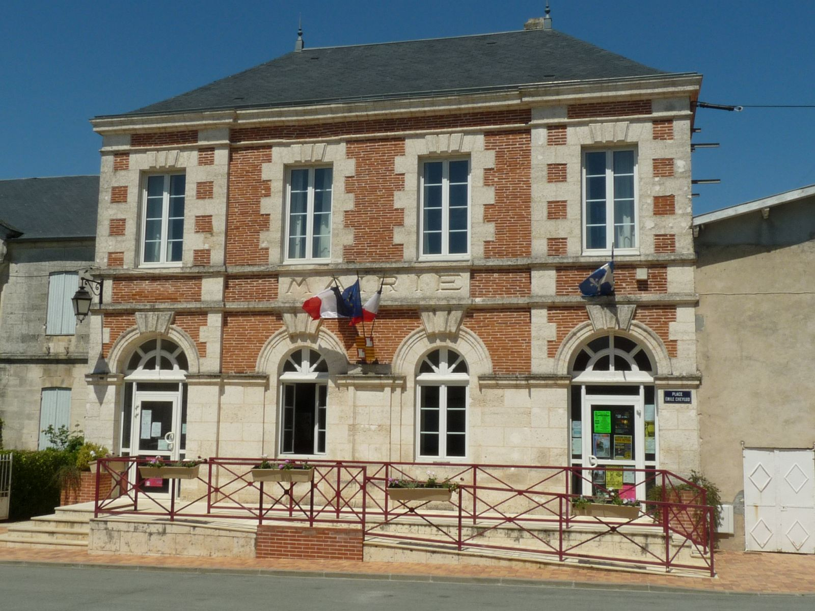 mairie de La Roche-Chalais, Dordogne, France